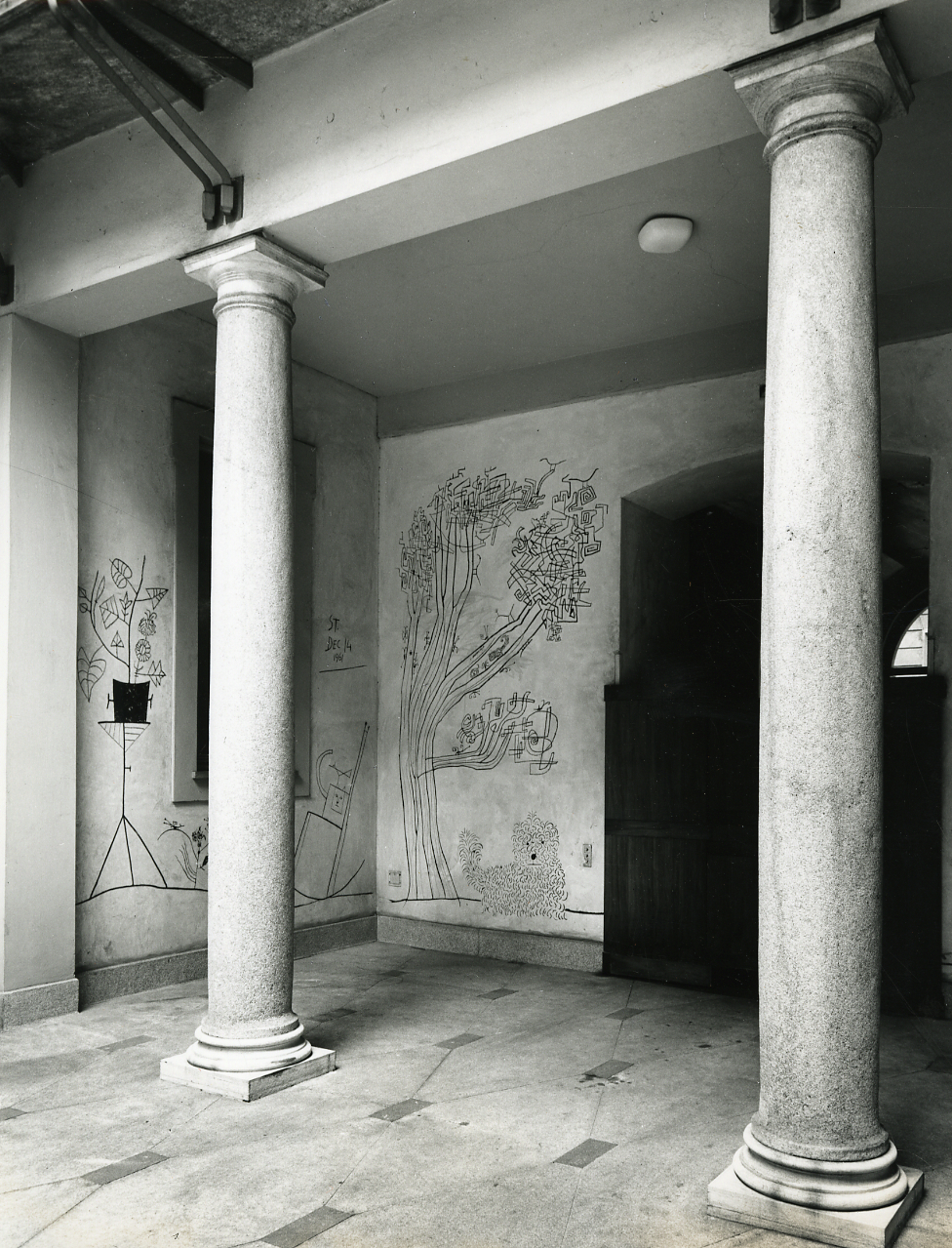 Servizio fotografico : Milano, 1963 / Paolo Monti. - Stampe: 1 : Positivo b/n, gelatina bromuro d'argento/ carta, 24x30. - ((Al verso della stampa manoscritto il numeri dei negativo corrispondente: 7662. Sul coperchio della scatola, manoscritto a pennarello: "Archit. Moderna". - Il graffito è andato distrutto. - : R 1 - Monti/ 1 aprile 1963 - 6 giugno 1964/ 6000-8193 (1963-1964), presso Archivio Paolo Monti. - Fonte: Rubrica di Paolo Monti: Archivio fino 1-4-1961/ 31-3-1963 (1961-1963), presso Archivio Paolo Monti. - Fonte: Agenda di Paolo Monti